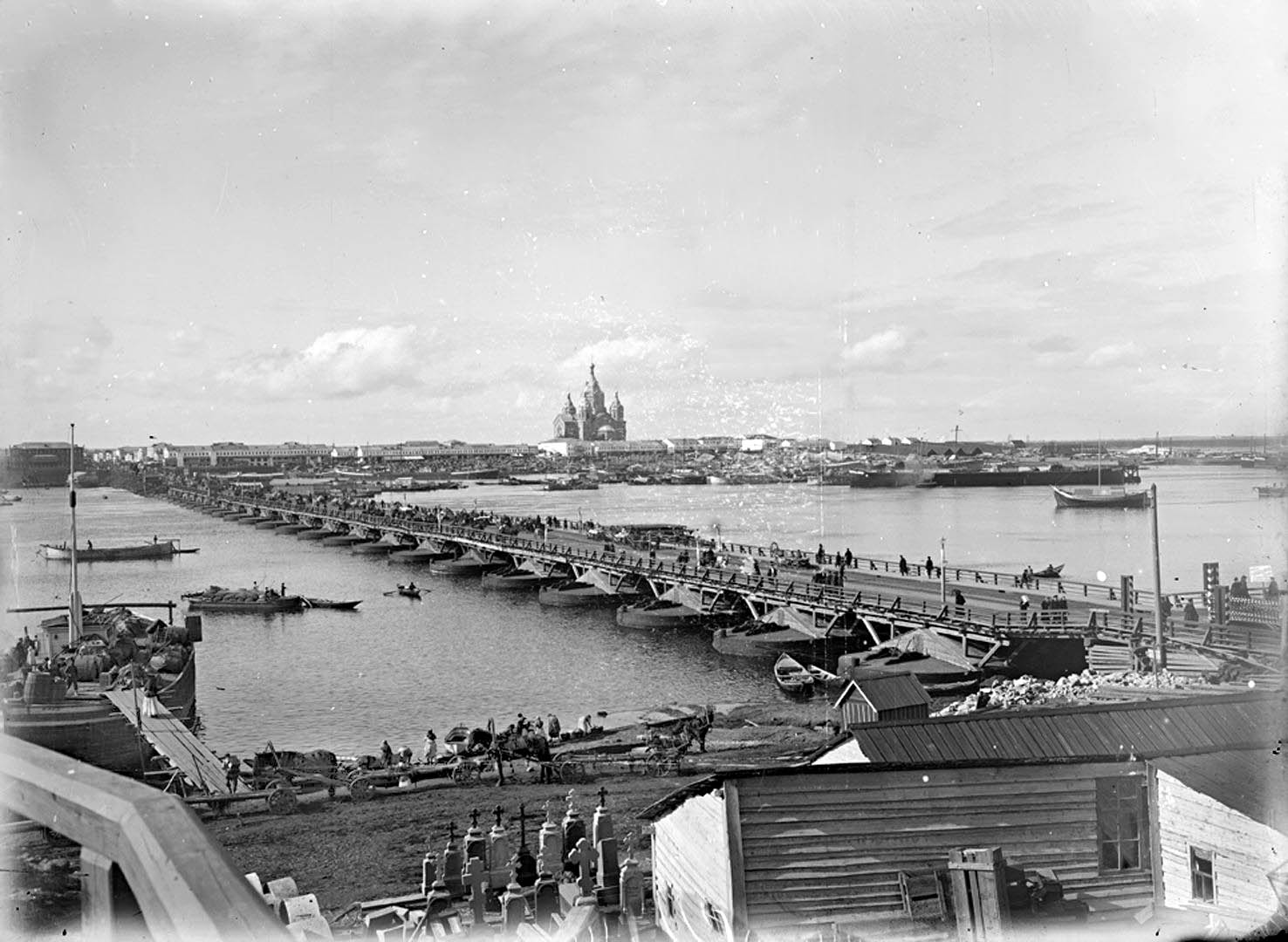 Фотографии Нижнего Новгорода конца 19-начала 20 века